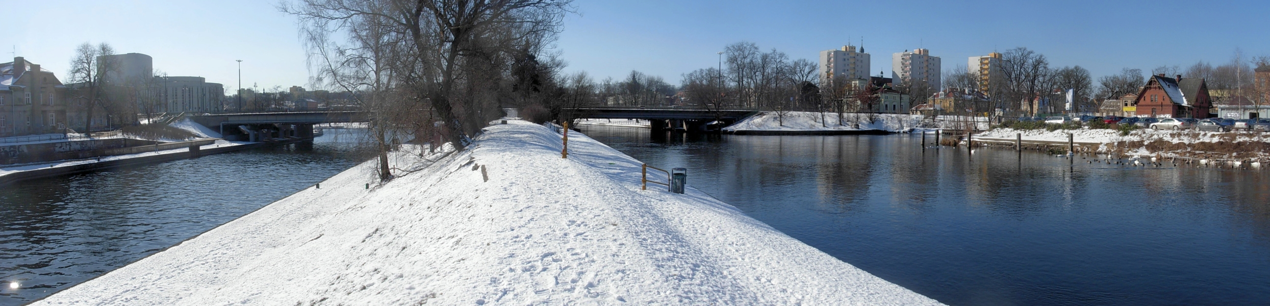 Rozdział Brdy w Bydgoszczy na główny nurt (z lewej) i Młynówkę (z prawej) o poziomie wyższym o 3 m, opływającą Wyspę Młyńską. Z prawej akwen będący reliktem zasypanej części Kanału Bydgoskiego oraz dom śluzowego przy dawnej śluzie II